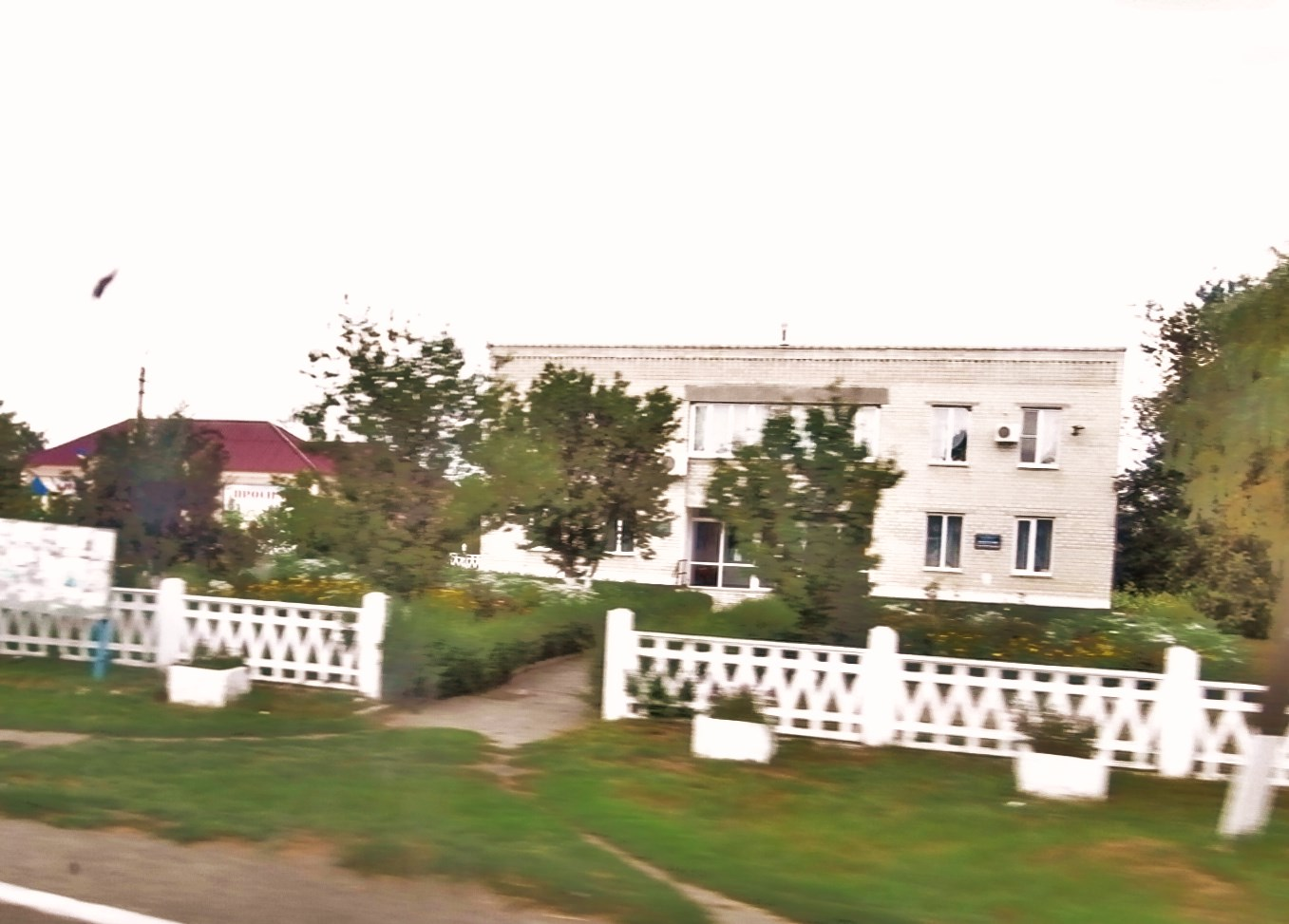 Rathaus Hanniwka, Ukraine Oblast Kiroworad